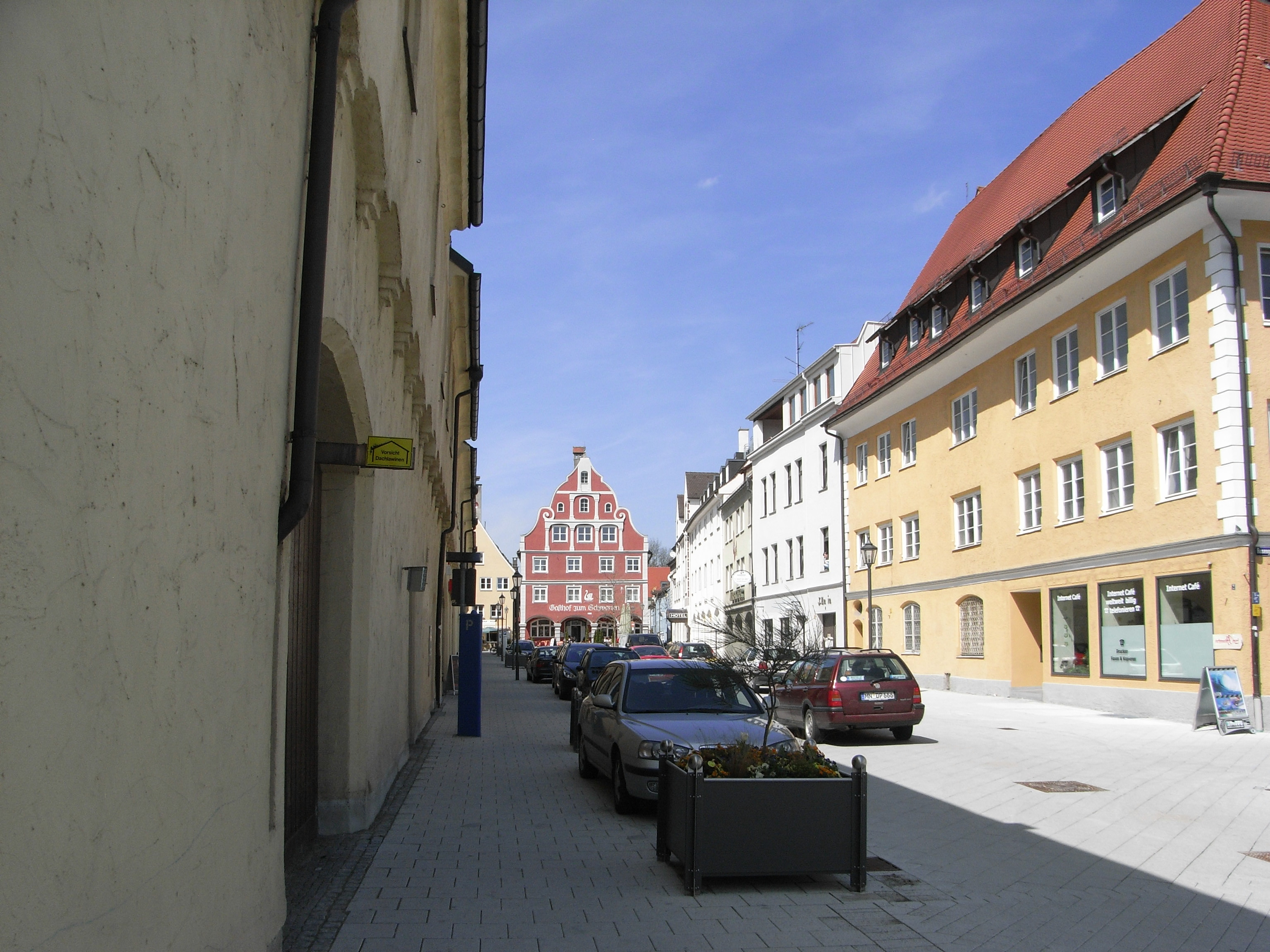 Die Salzstraße. Links der Salzstadel, welcher sich über die komplette Straße erstreckt. Vorne der Schwanen.